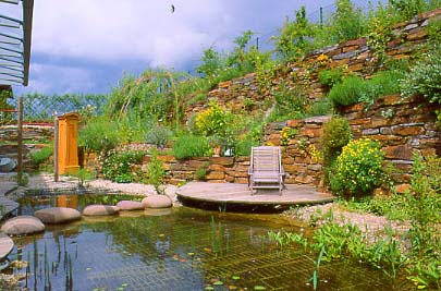 Beispiel für einen relativ kleinen Naturgarten mit heimischen Wildpflanzen an einem Hang (u.a. mit Naturteich, Sitzplatz, Wildblumenbeete, Weidenjurte, Terrassen und hohen Natursteinmauern aus Gneis).